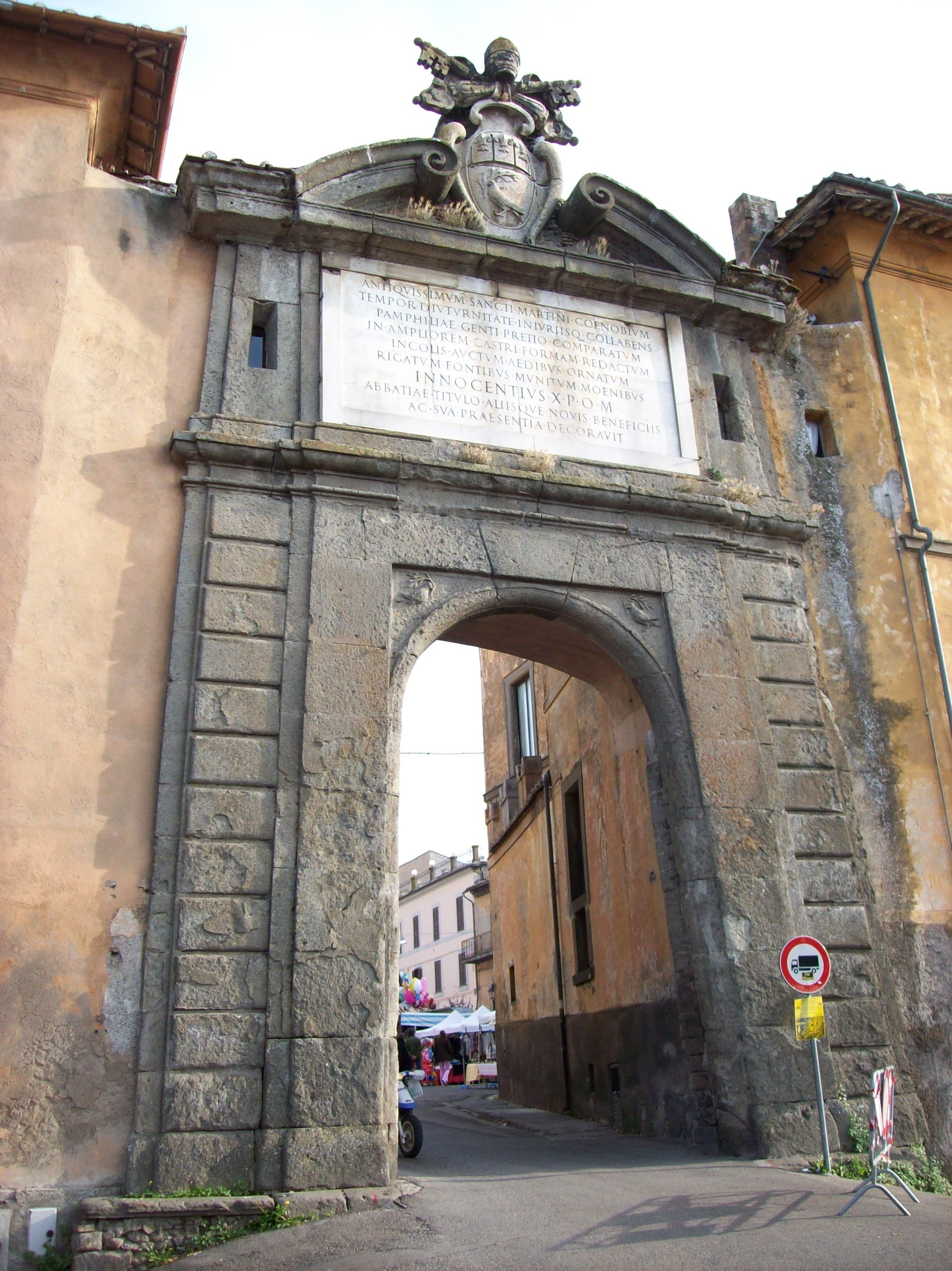 Porta a valle di san Martino al Cimino, Viterbo